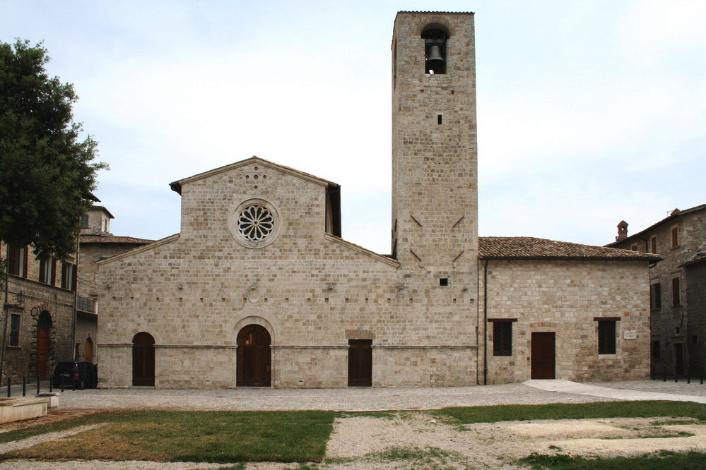 Chiesa di San Tommaso Apostolo di Ascoli Piceno.